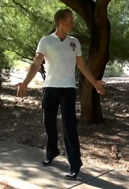 menoleh